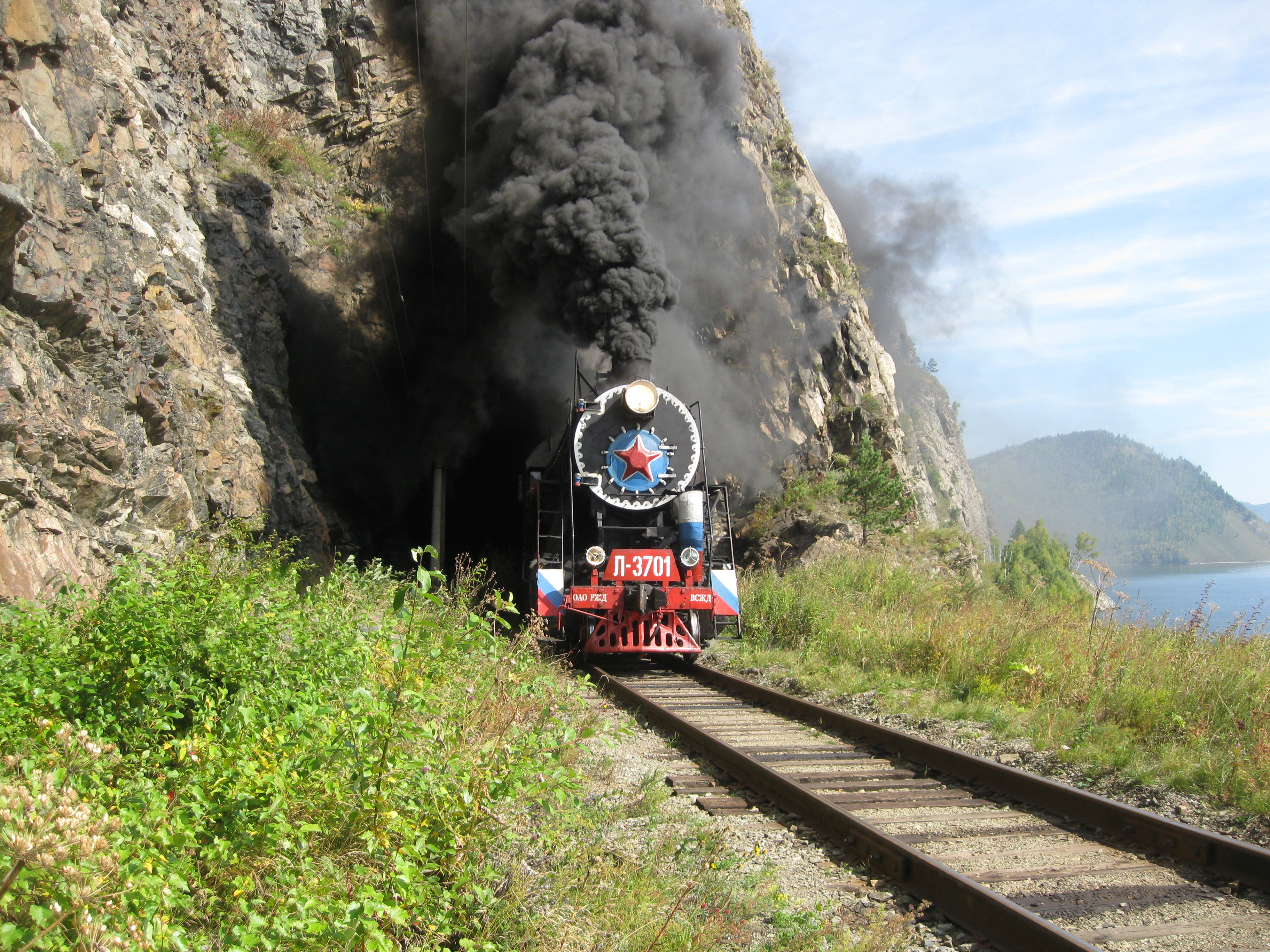 Туристический поезд на Кругобайкальской железной дороге.